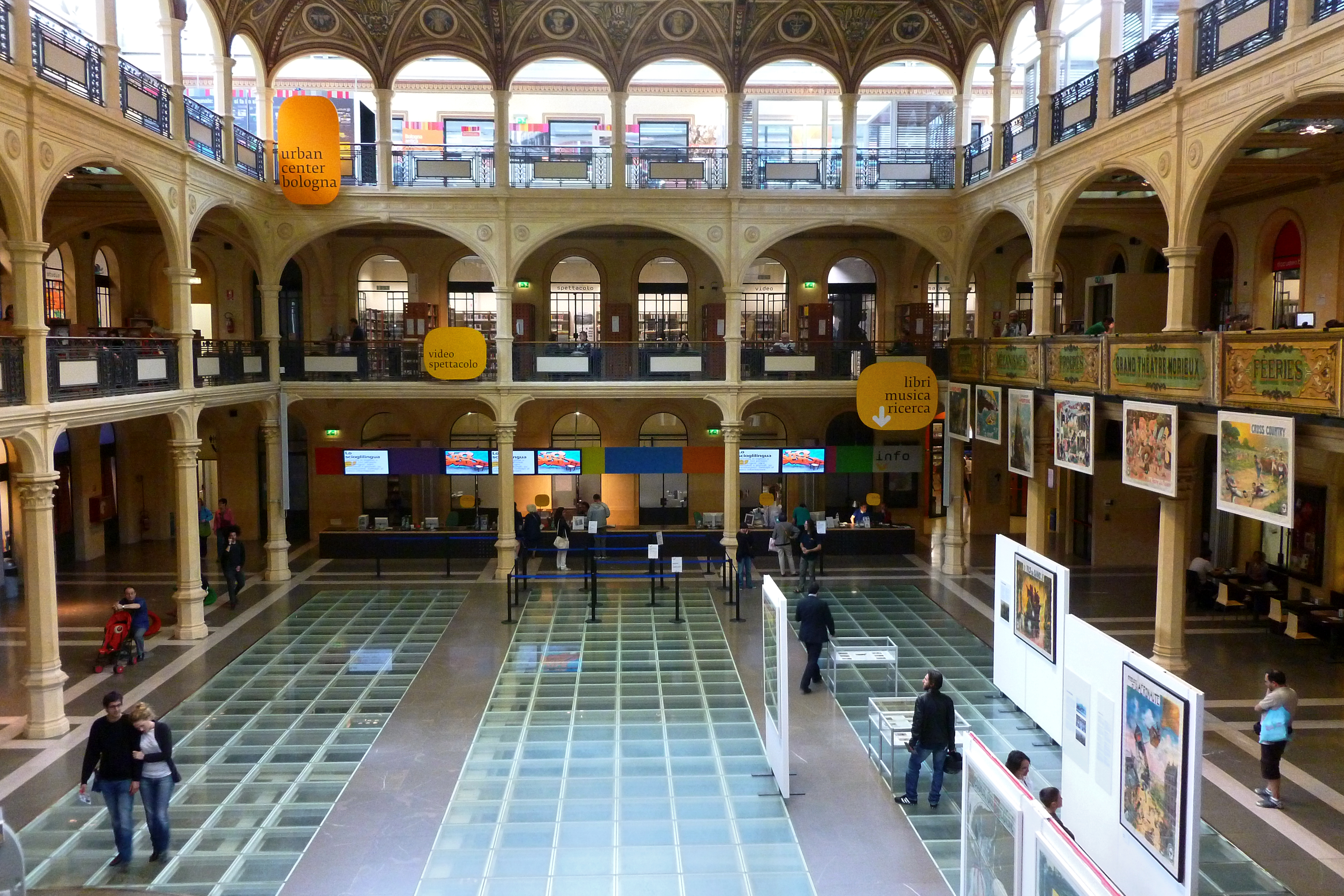 Biblioteca Salaborsa